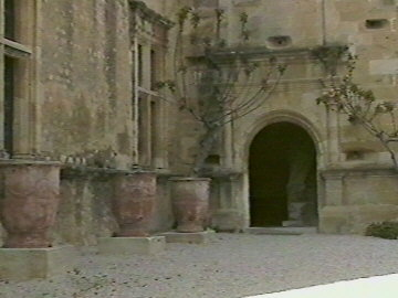 Vue sur la cour du château de Lourmarin. Photo extraite d'une vidéo réalisée par moi-même lors d'un balade dans le petit Luberon en 1997 ou 98. Extraite de mon site